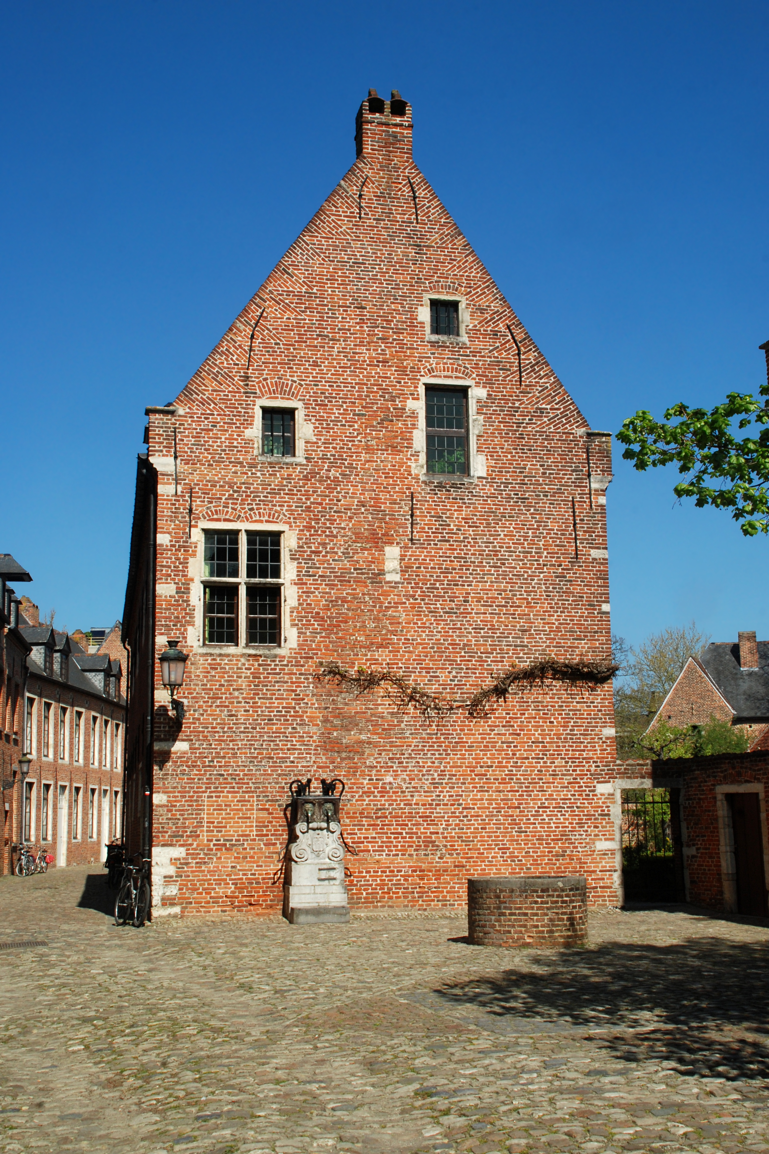 Belgium - Leuven - Groot Begijnhof - Convent van Lommel - Benedenstraat 41